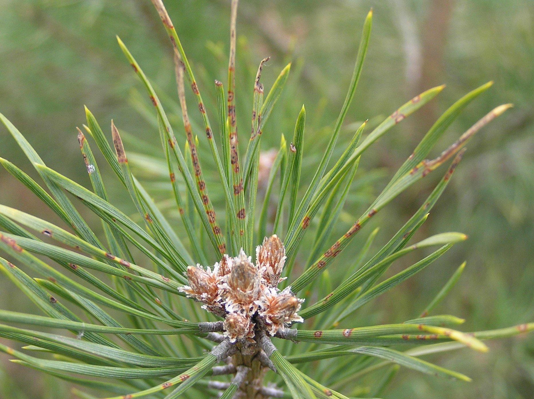 Brachonyx pineti, Żer krótkostopki sosnówki